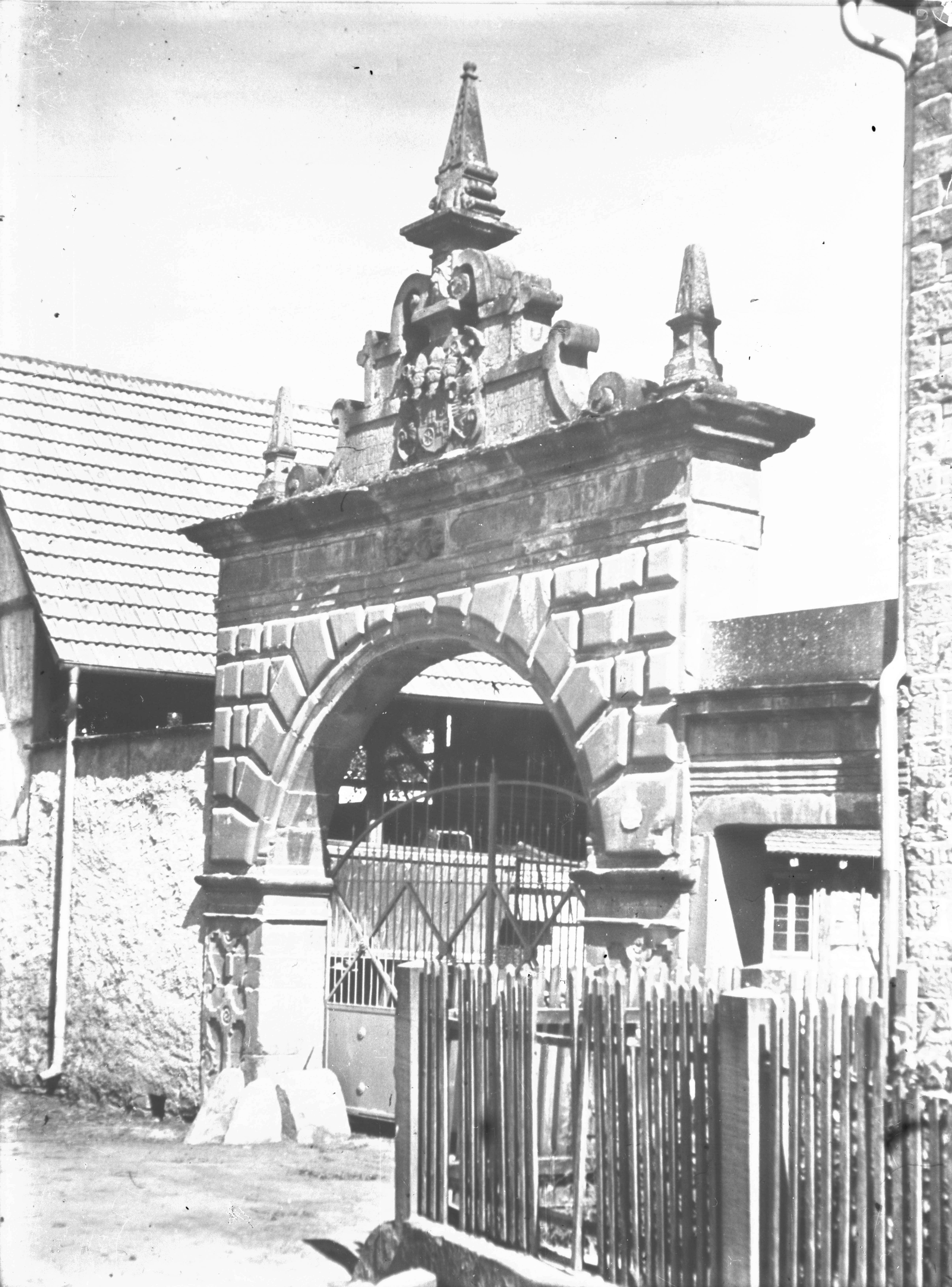 Altes Stadttor von Tauberbischofsheim bei der Halbigsmühle (Rollenmühle) Tauberbischofsheim; Stadttor, Tor